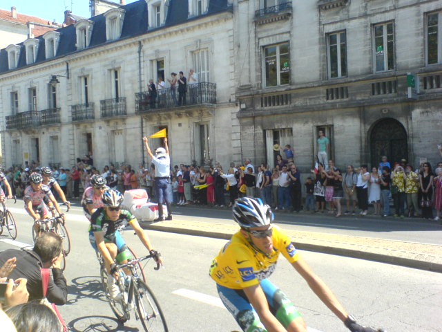 Le Peloton lors de son passage à Périgueux